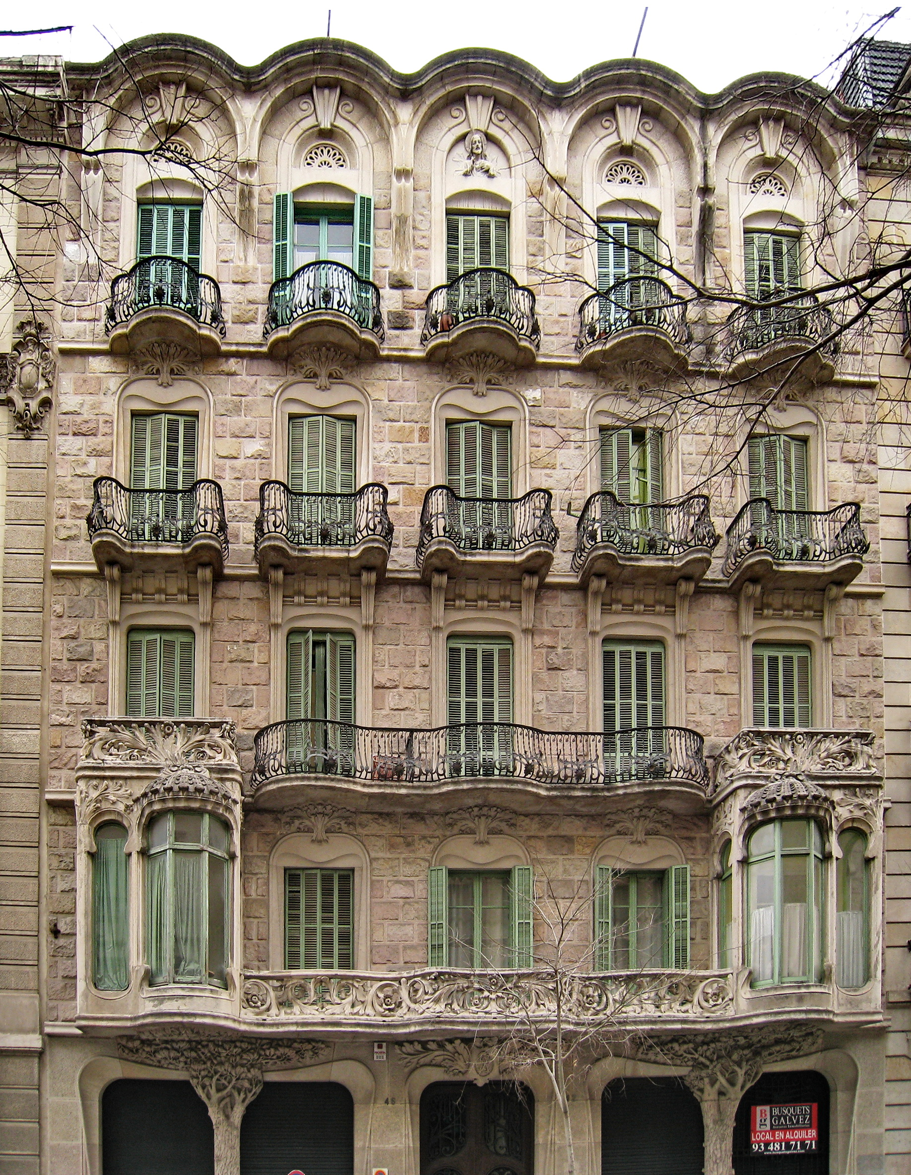 Casa Antonia Burés, obra de Batllevell (Barcelona)